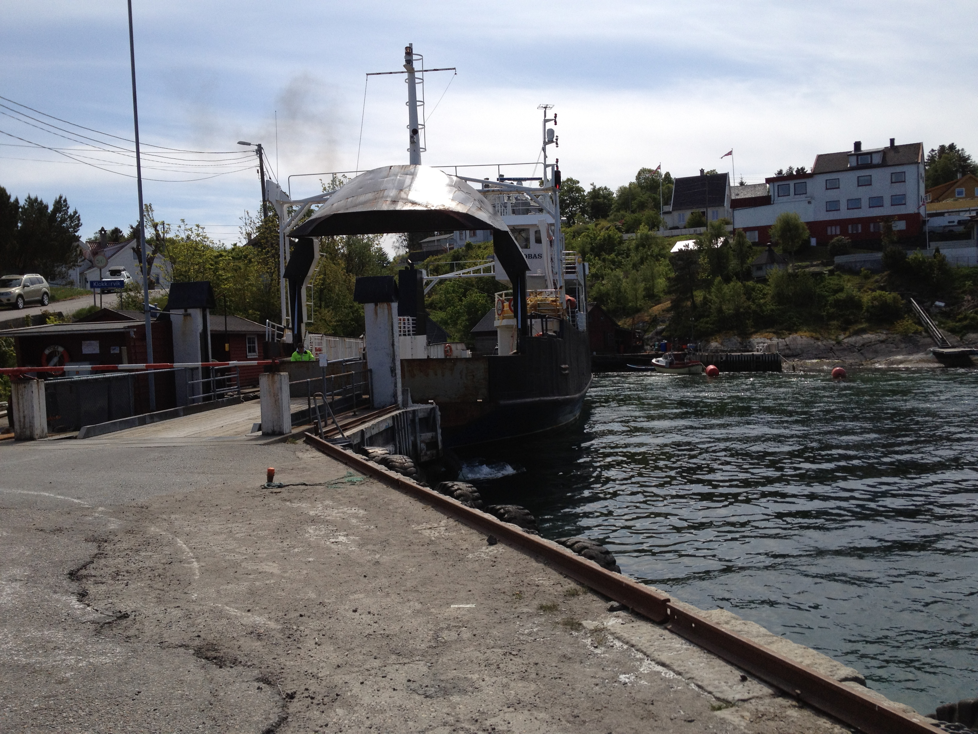 MF Fjordbas til kai i Klokkarvik.